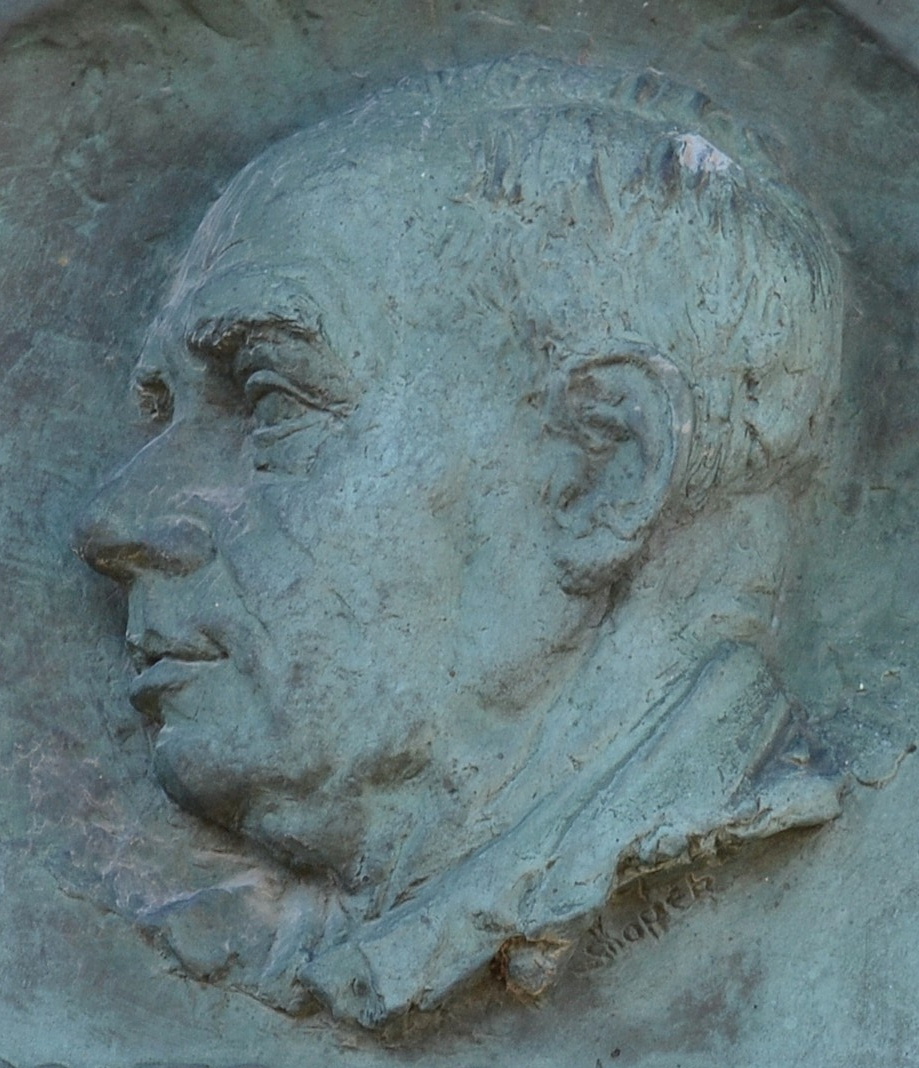 Vlčkovce (okr. Trnava), pamätná tabuľa na rodnom dome Fraňa Štefunku